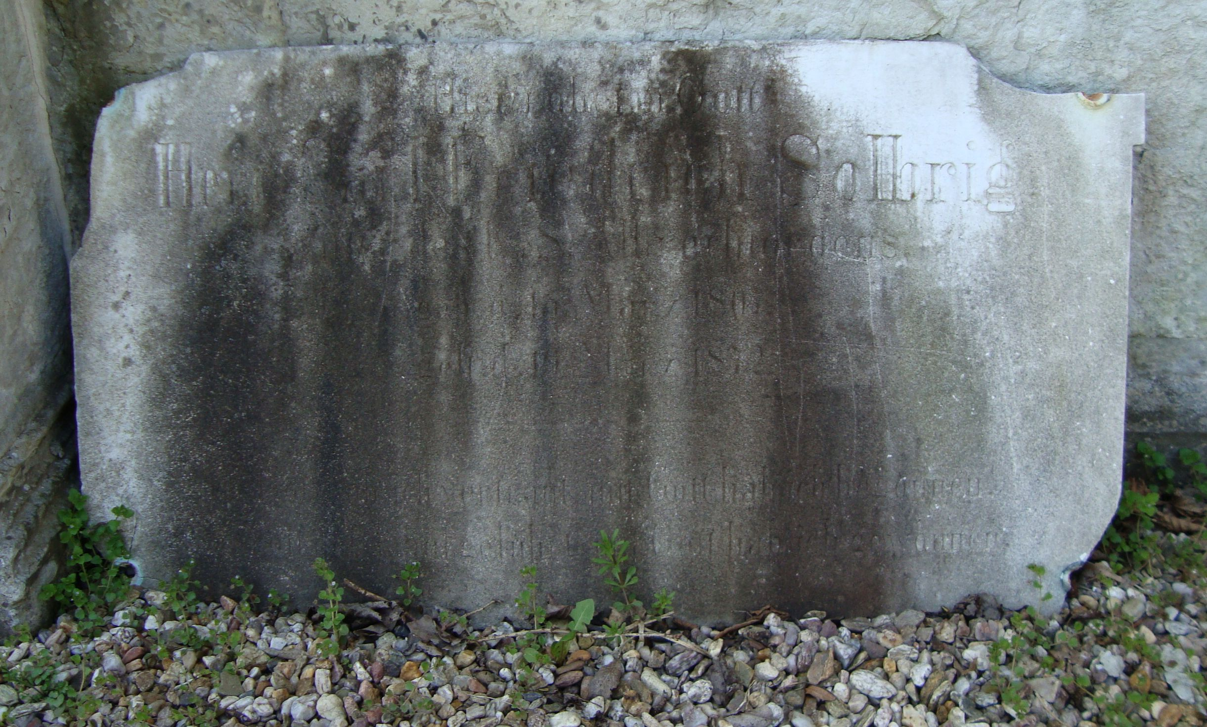 Verwitterter Grabstein von Carl Friedrich Solbrig auf dem alten Friedhof von Chemnitz-Harthau